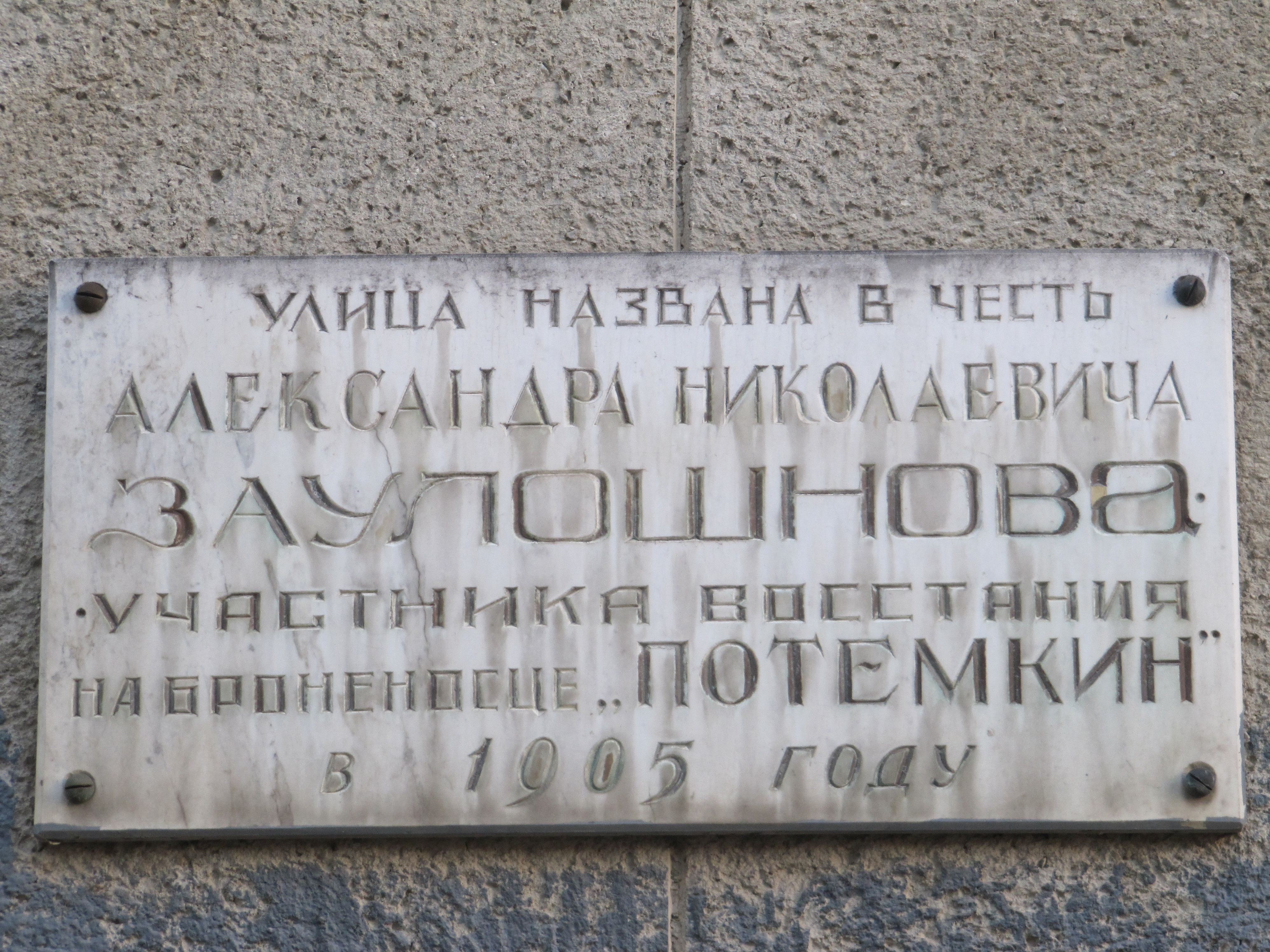 Улица Заулошнова Александра Николаевича названа в честь участника восстания на броненосце "Потёмкин" в 1905 г.